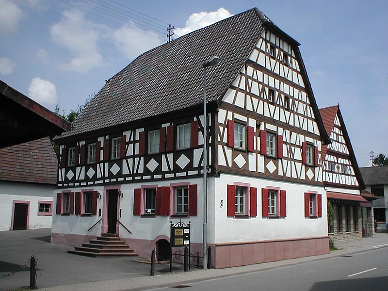 Fachwerkhaus in Aglasterhausen, Mosbacher Straße 3 (siehe Erwin Huxhold: Die Fachwerkhäuser im Kraichgau. Ein Führer zu den Baudenkmälern. Hrsg. vom Heimatverein Kraichgau e.V., 3. ergänzte Auflage, Ubstadt-Weiher 2002, S. 16, ISBN 3-89735-185-4.)